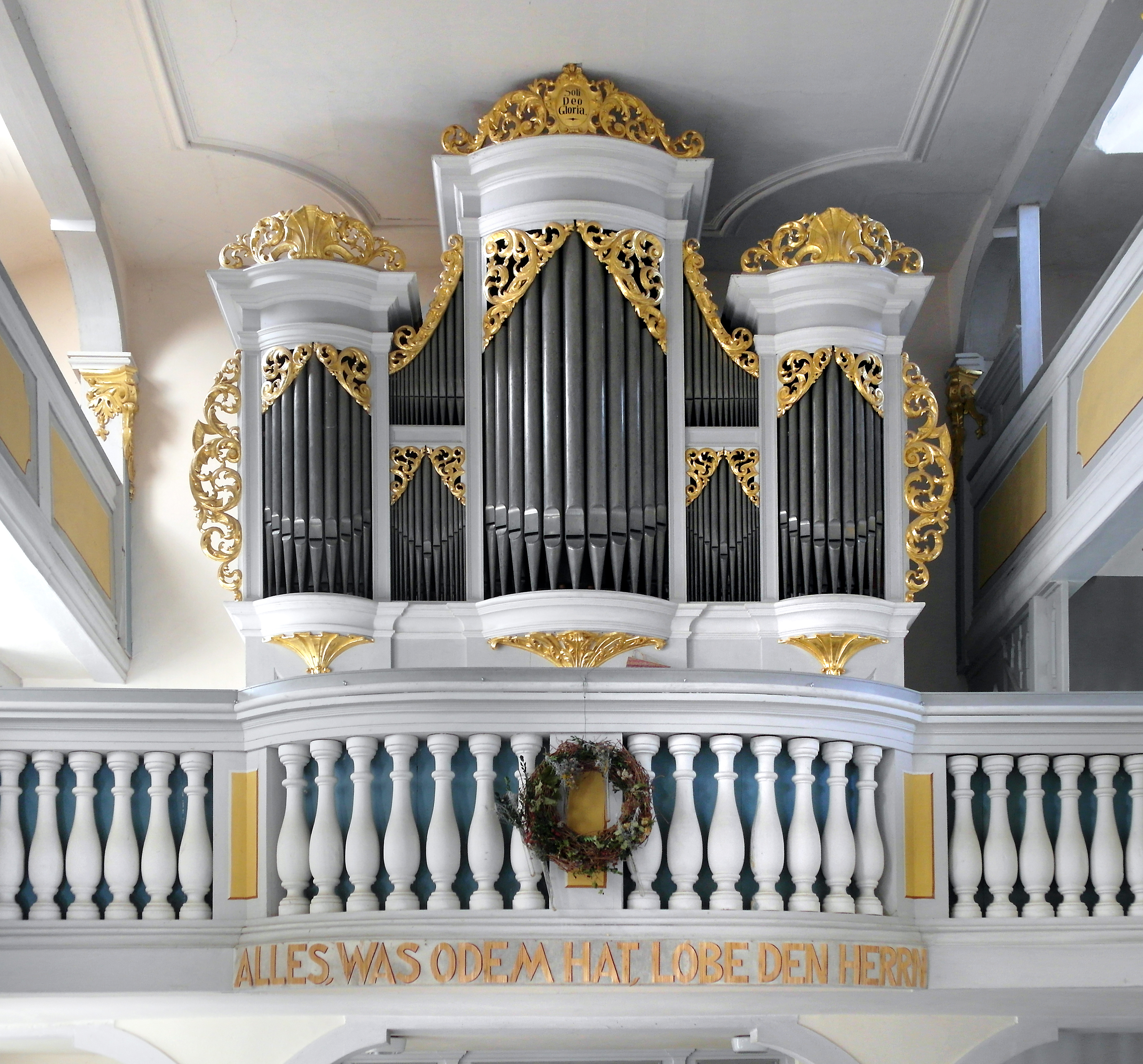 31.10.2019 01768 Reinhardtsgrimma (Glashütte): Spätgotische Dorfkirche (GMP: 50.893779,13.753364), erbaut um 1500, 1742 umgebaut. Orgel 1729/1730 von Gottfried Silbermann. [SAM1630.JPG]20191031115DR.JPG(c)Blobelt